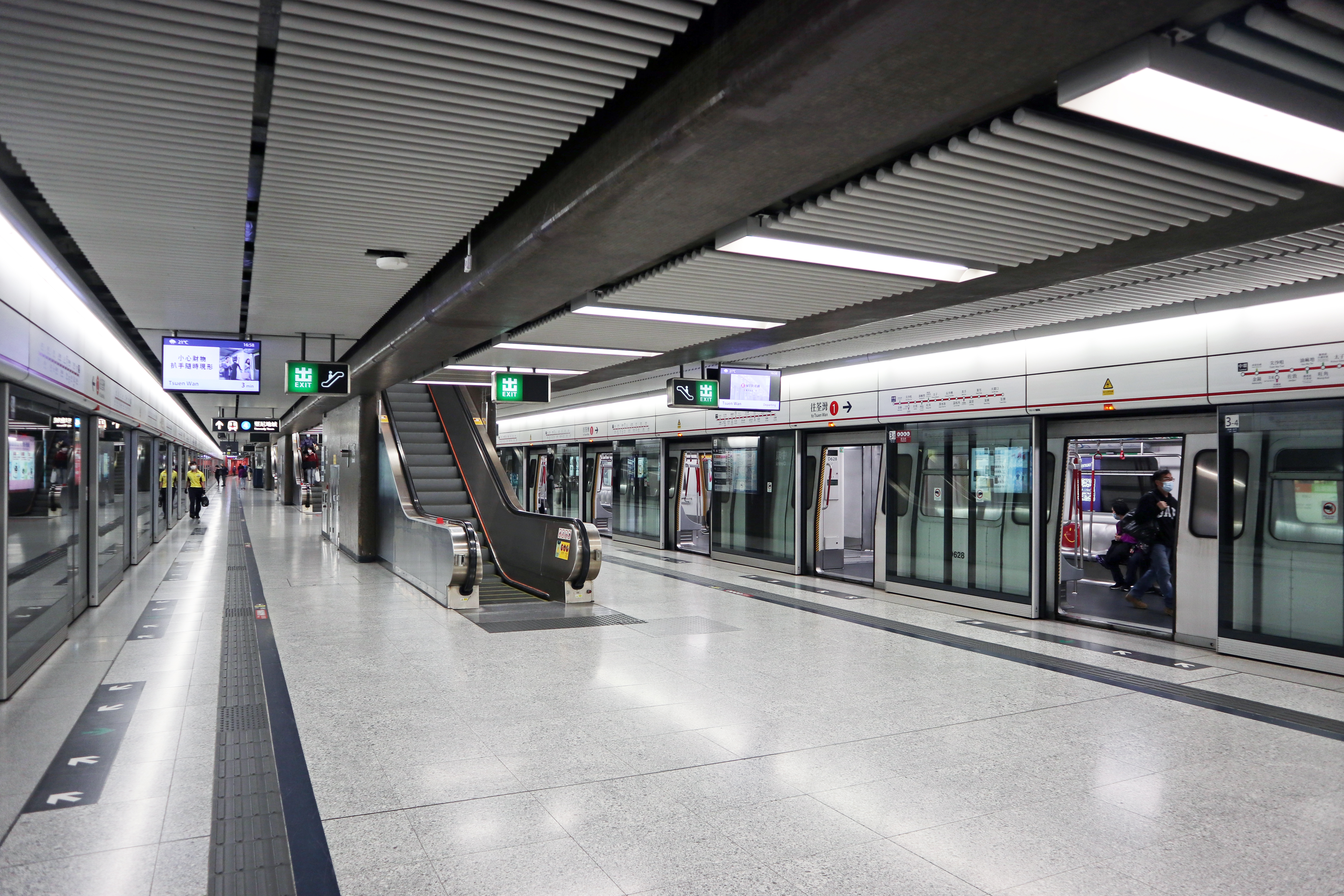 港鐵中環站月台